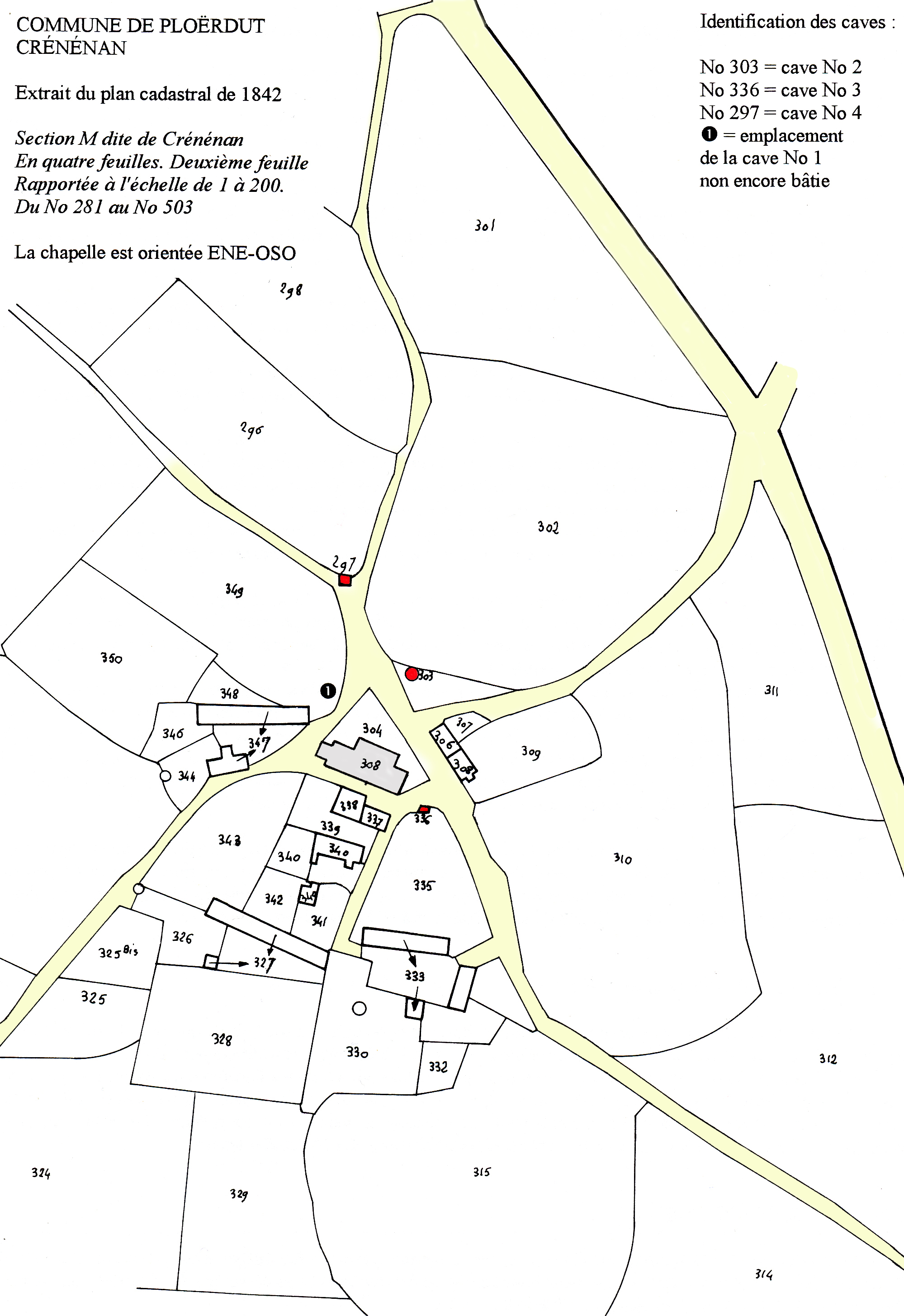 Cet extrait du plan cadastral de 1842 du hameau de Crénénan en Ploërdut donne les emplacements de quatre caves semi-enterrées indépendantes, toutes de même facture, construites sur le placître de la chapelle Notre-Dame de Crénénan dans la première moitié du XIXe siècle. Elles servaient à entreposer les boissons et les provisions consommées par les participants au grand Pardon qui se déroulait chaque année le premier dimanche après le 15 août. Ces quatre caves sont de rares témoins de la petite architecture utilitaire liée aux fêtes religieuses bretonnes.